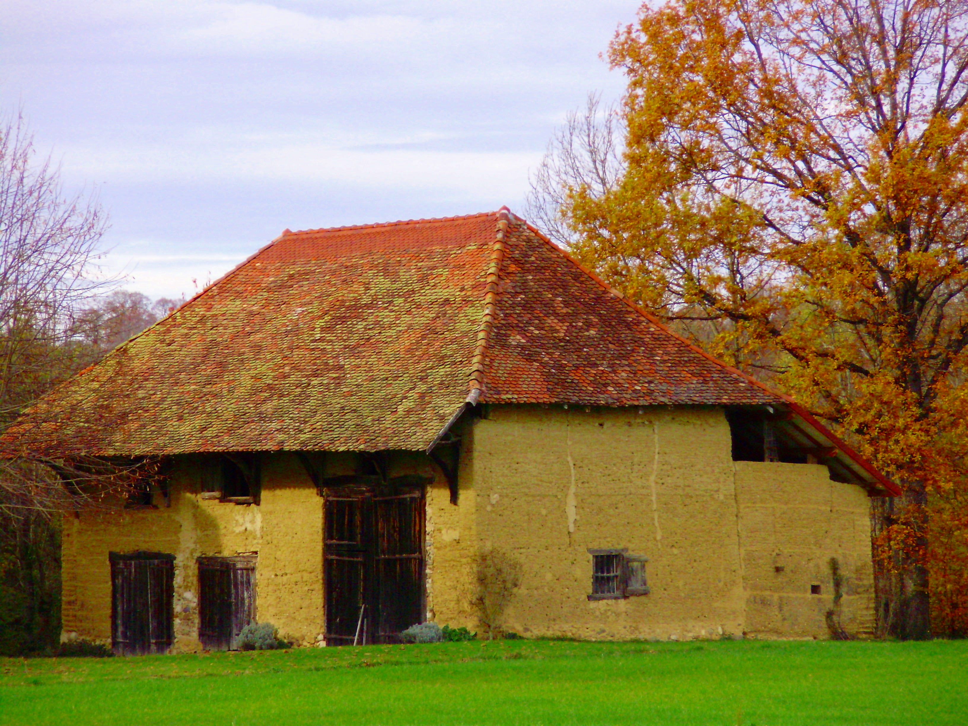 Ancienne grange en pisé sur la commune de Velanne, au lieu-dit des "Planchettes"